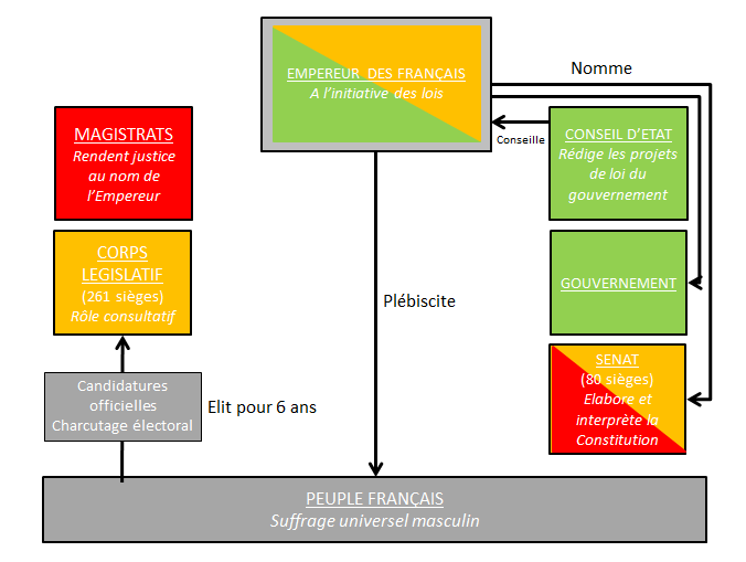 Constitution du Second Empire français en 1852